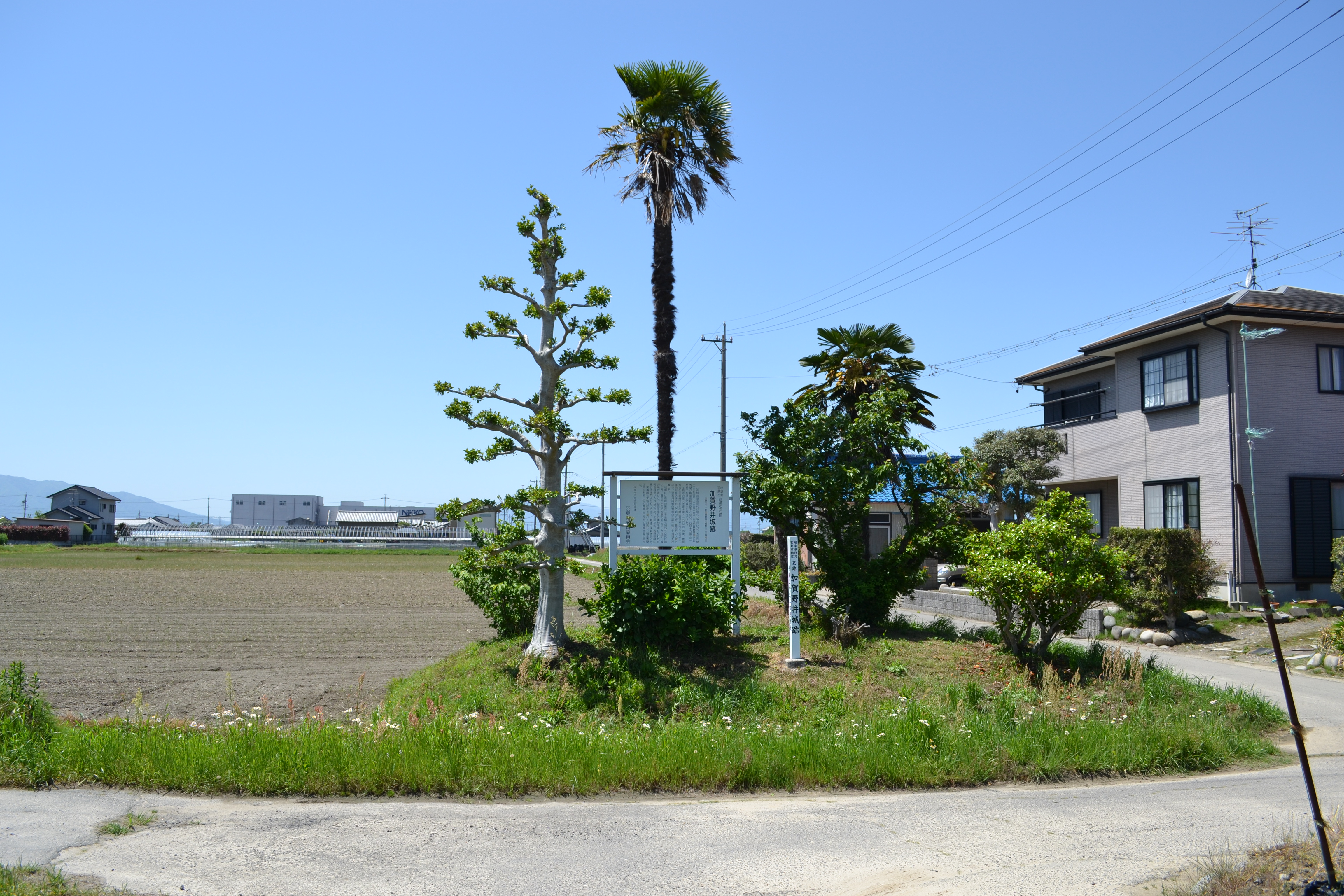 加賀野井城跡の様子。撮影位置後方には市指定有形文化財の阿弥陀如来立像があるが、標柱と説明板のみで本体は確認できなかった。